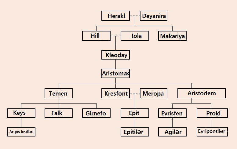 Heraklidlərin soyağacı